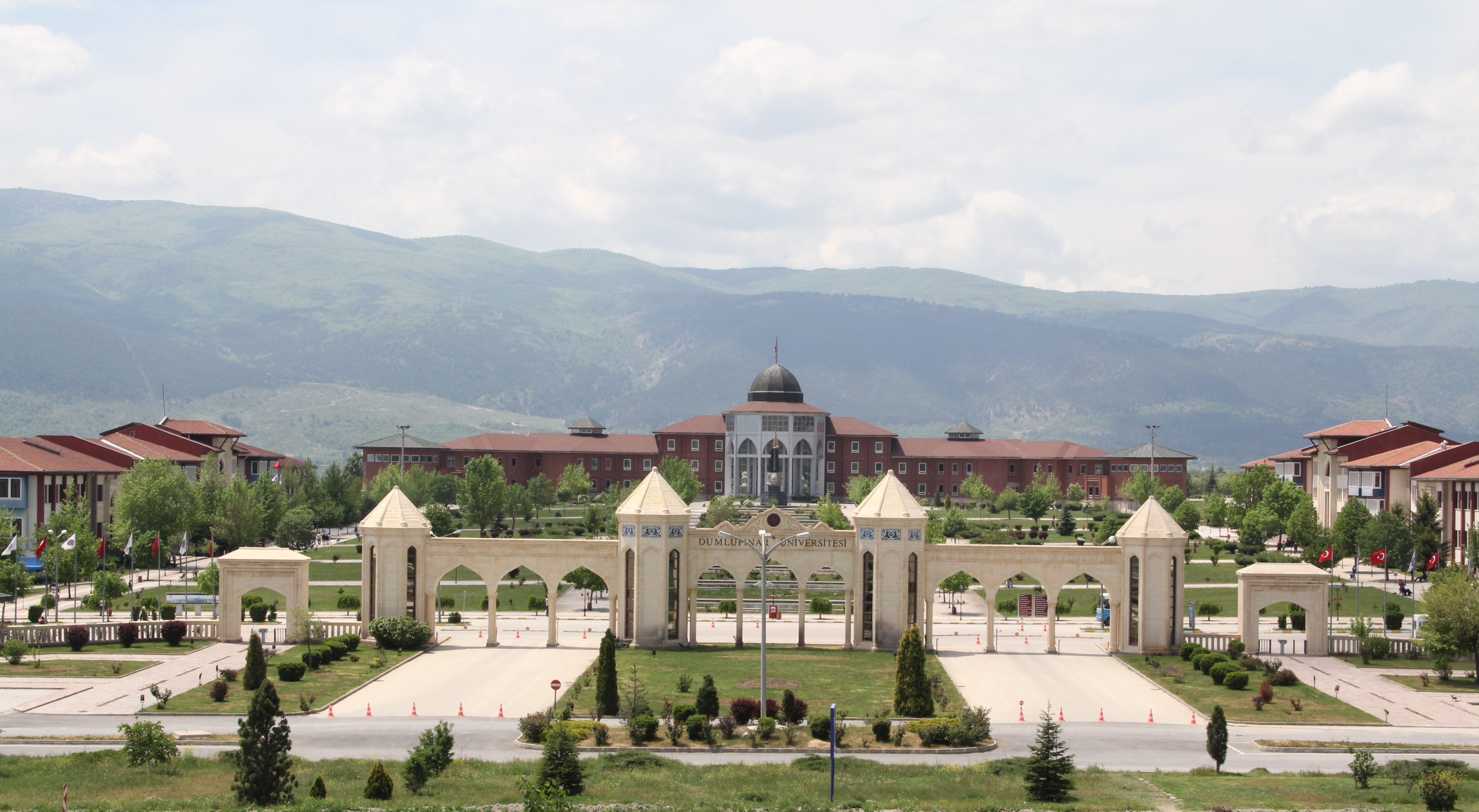 Kütahya Dumlupınar Üniversitesi Evliya Çelebi Yerleşkesi'nin ana kapısı olan Taç Kapı, Rektörlük binası, Fen Edebiyat Fakültesi (solda) ve Mühendislik Fakültesi (sağda).